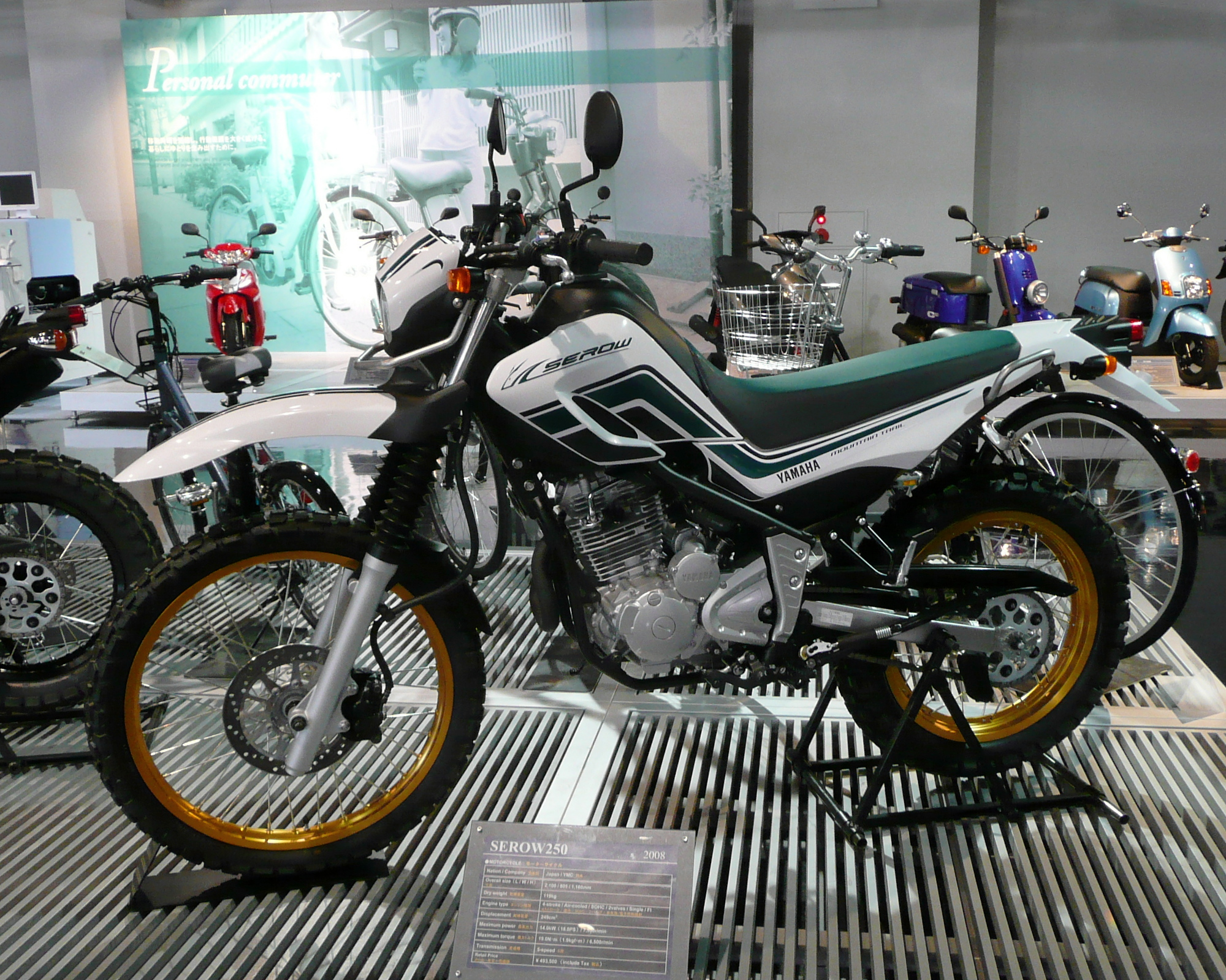 ヤマハ・セロー（SEROW250）、2008年、ヤマハコミュニケーションプラザにて撮影